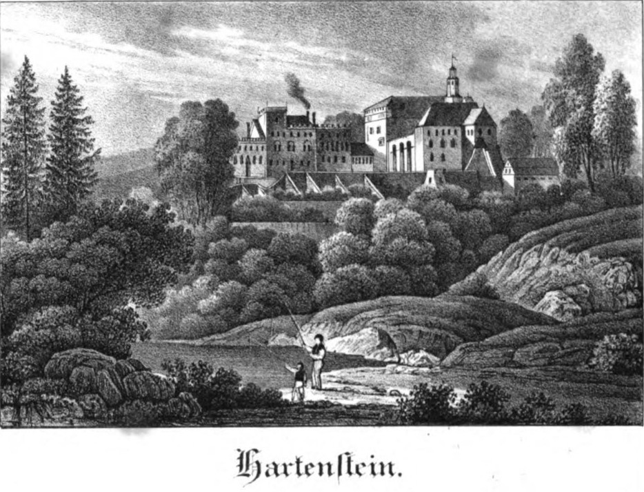 Saxonia Museum für saechsische Vaterlandskunde. Band 1. Dresden: Pietzsch und Comp. Siehe File:Saxonia Museum für saechsische Vaterlandskunde I.djvu